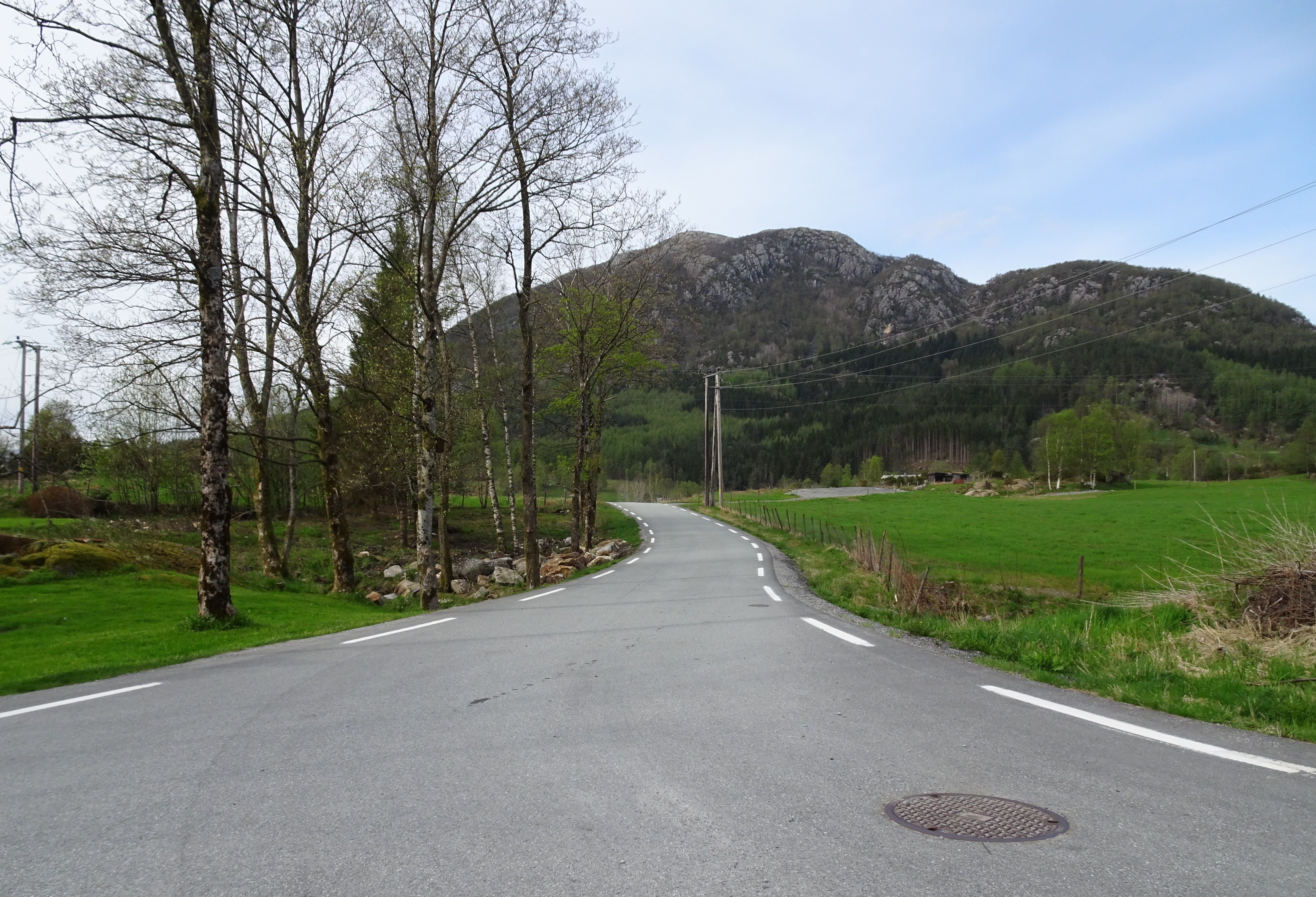 Sørenden av Blikravegen (fylkesvei 737) mot primær fylkesvei 46